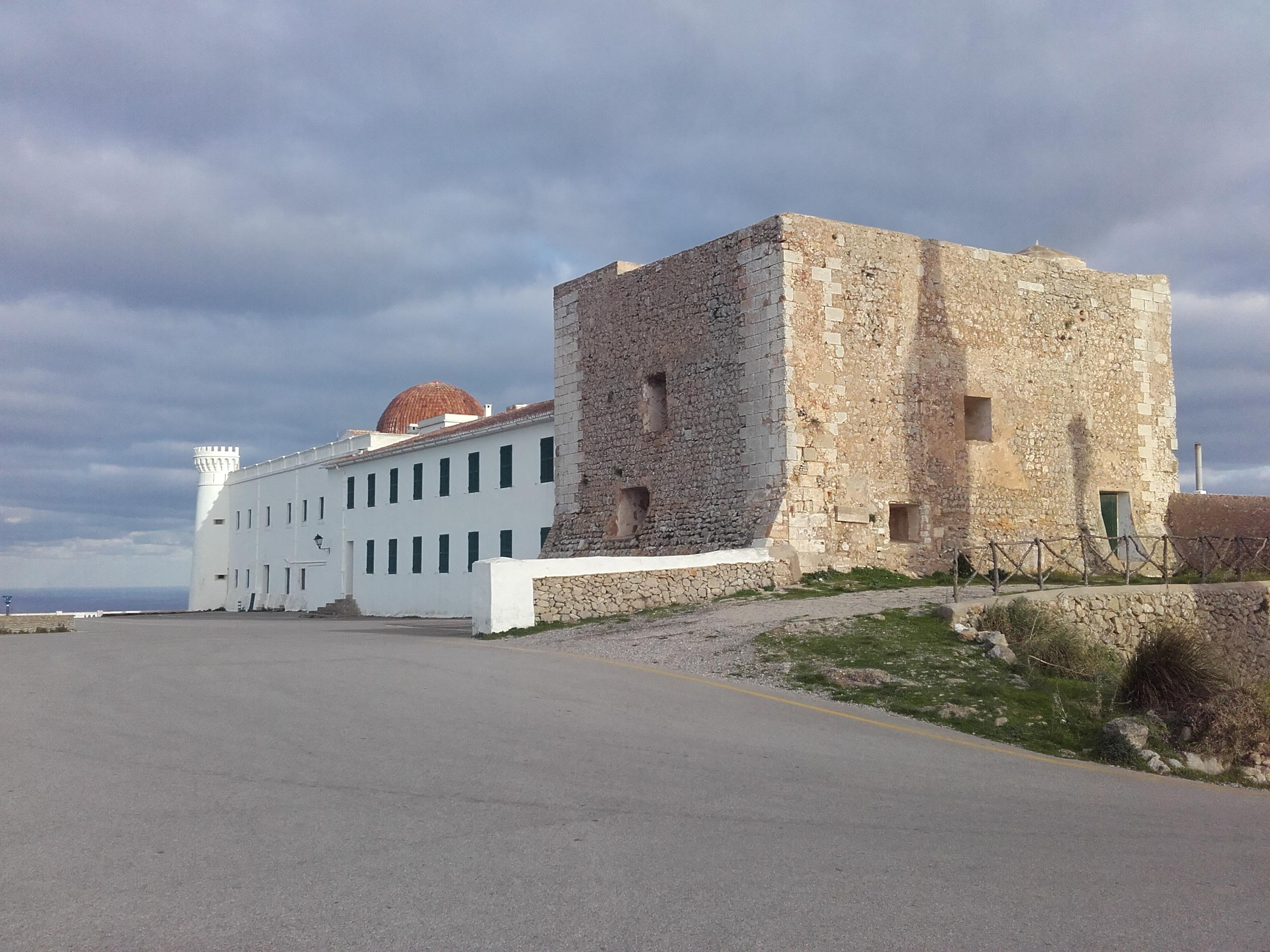 Iglesia de El Toro, Menorca, Islas Baleares, (España)